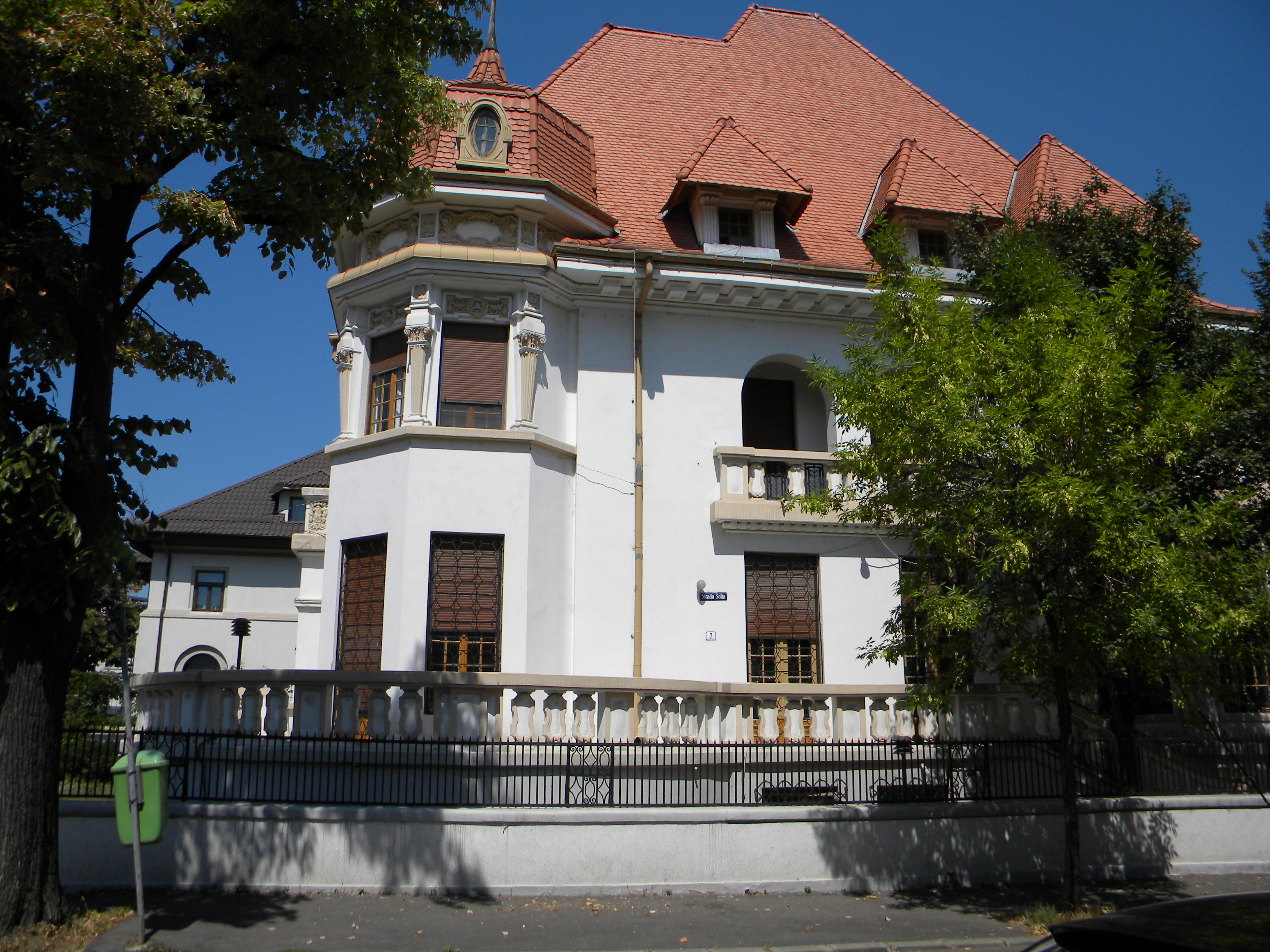 Vila pe Strada Sofia nr. 7, Bucuresti sect. 1